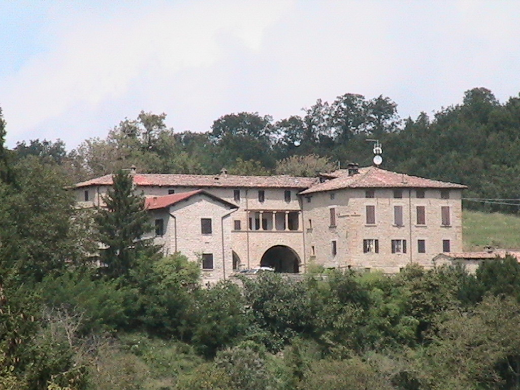 Scurano (Neviano degli Arduini) - Casolare